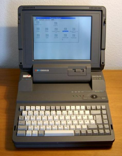 Amstrad ACL-386SX120, 4MB Speicher, 120MB Festplatte, Windows 3.1